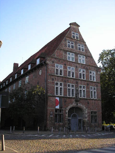 Dieses Bild stellt das Völkerkundemuseum in Lübeck dar.